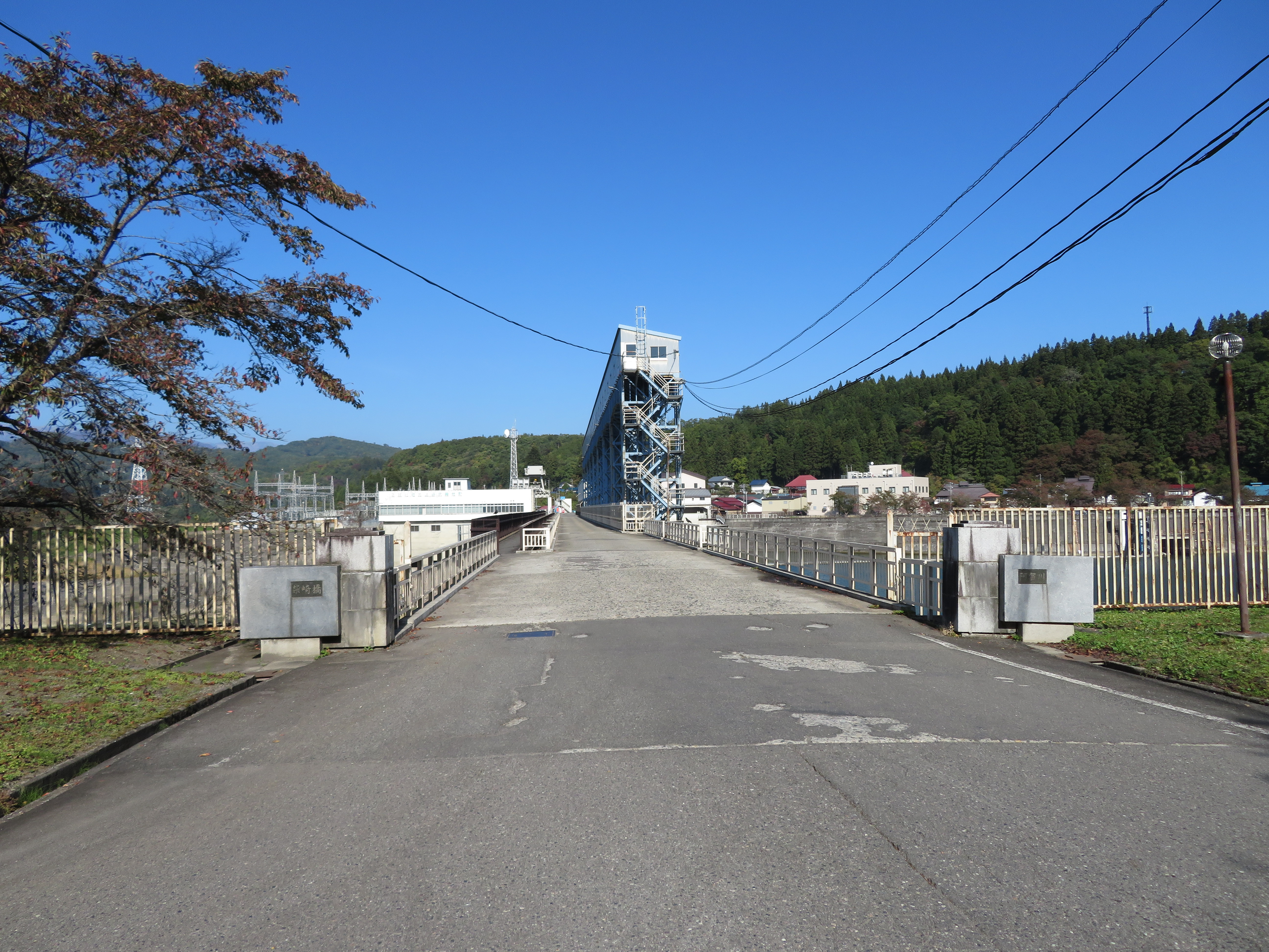 福島県耶麻郡西会津町の阿賀川に架かる柴崎橋 Canon PowerShot SX720 HS